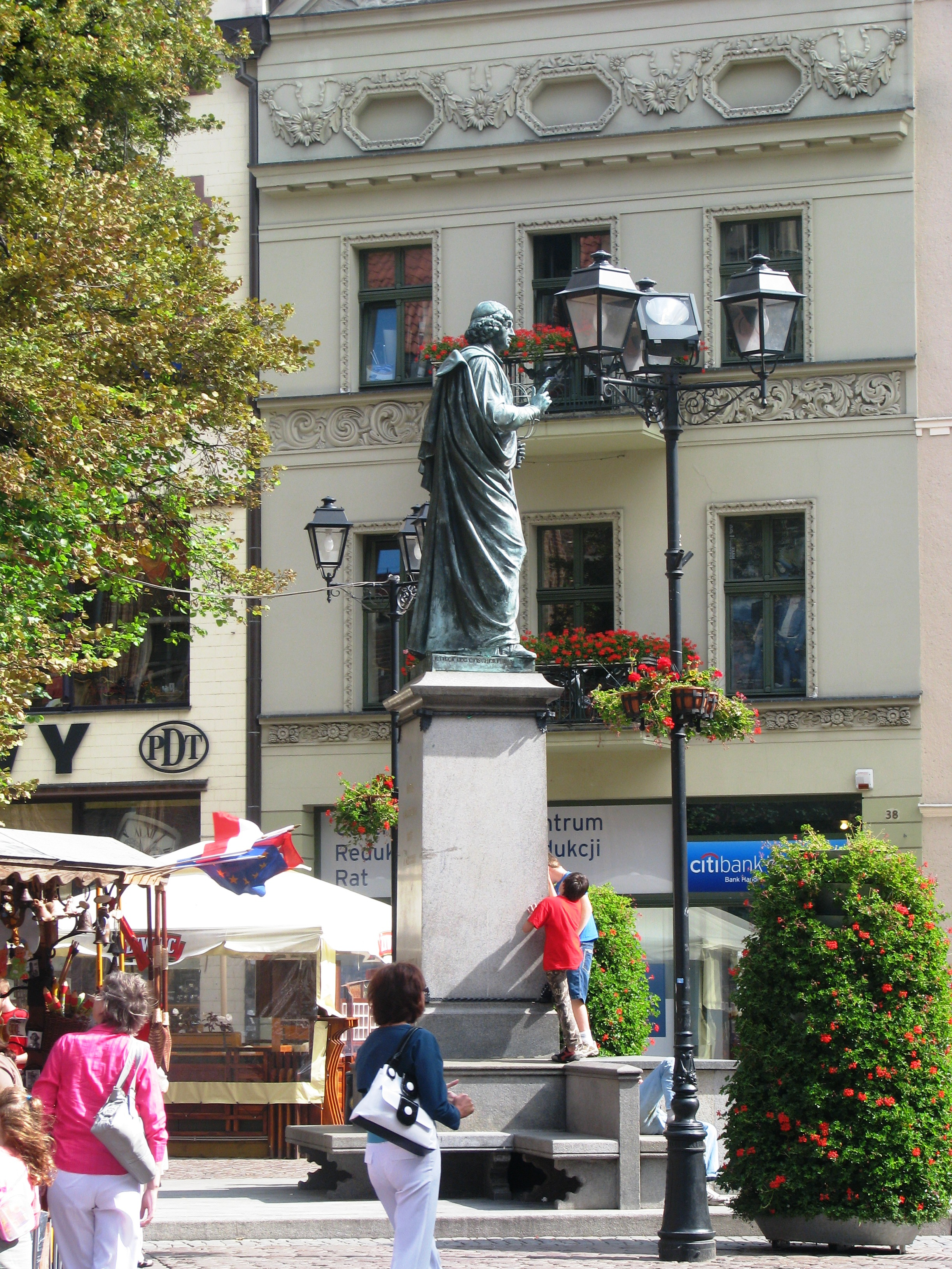 Toruń - Pomnik Mikołaja Kopernika w zespole Rynku Staromiejskiego